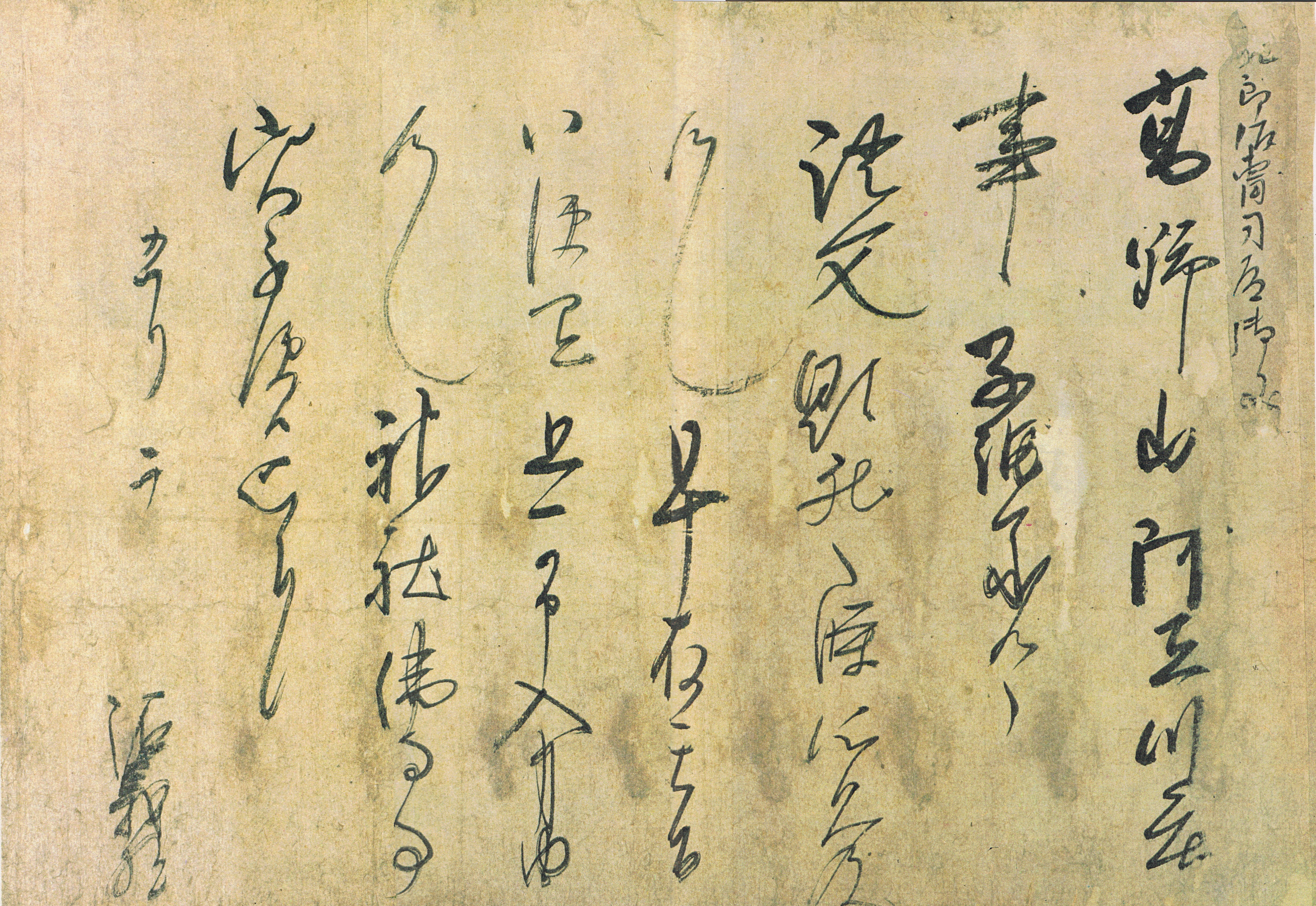 「源義経請文」（原寸）『「（貼り紙）九郎御曹司殿御文」高野山阿弖川庄事、子細承候了、證文顯然之條所見及候也、早存其旨、以便宜且可申入事由候也、神社佛寺事実不便候、恐々謹言 五月二日 源義経』 高野山領紀伊阿弖川庄が同地の寂楽寺に押領されたので、その回復の命をうけ、義経が鎌倉の頼朝に指示を求める旨を回答したもの。